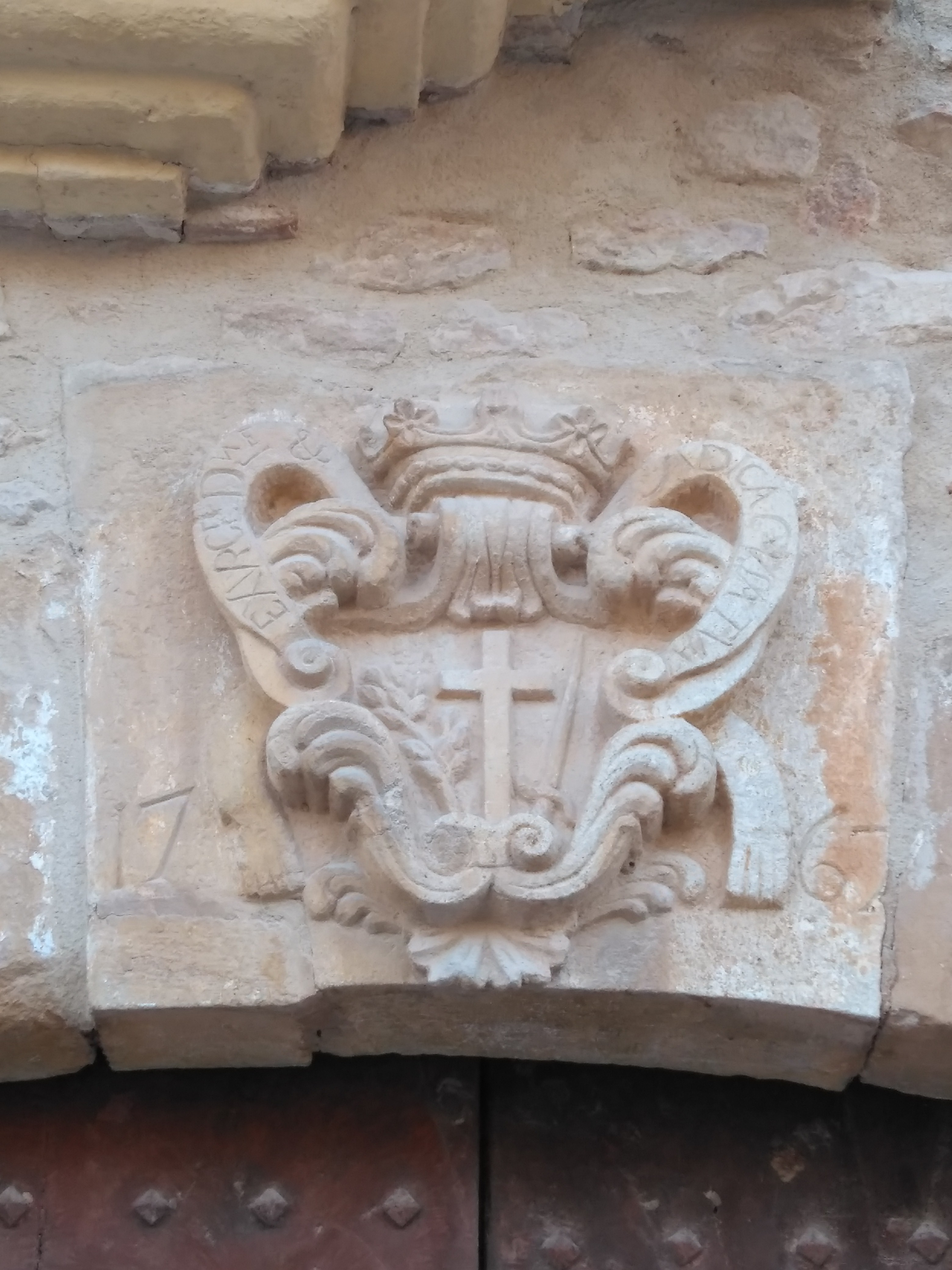 Habitatge a Casafort (Nulles). L'escut té la inscripció de l'any 1767 i hi ha una creu, una espasa i una branca d'olivera, símbols vinculats al Sant Ofici i s'hi pot llegir, en llatí, "El Senyor promou la teva causa i la jutja".